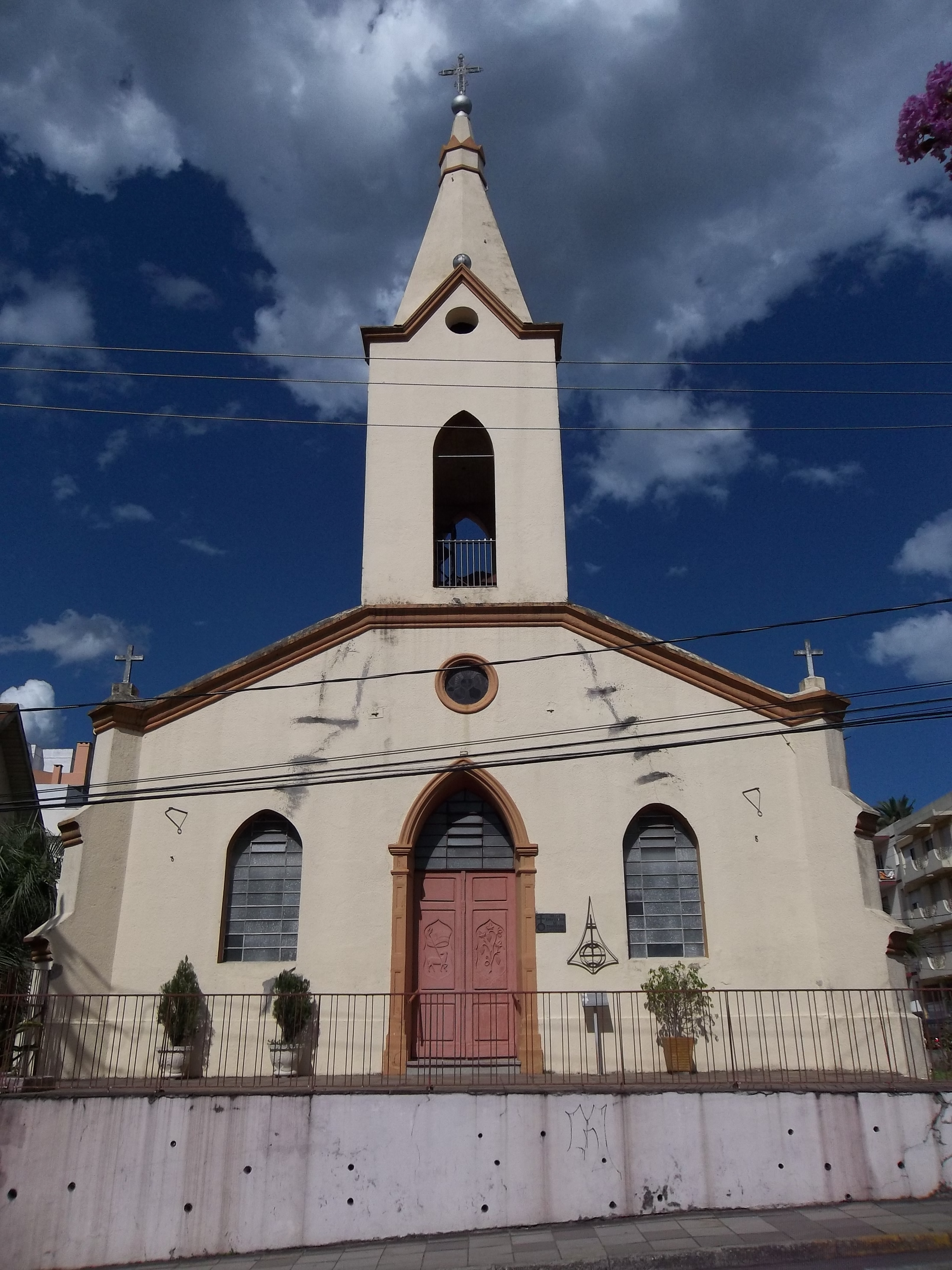 Igreja Evangélica de Confissão Luterana. Bonfim, Sede, Santa Maria, Rio Grande do Sul, Brasil.